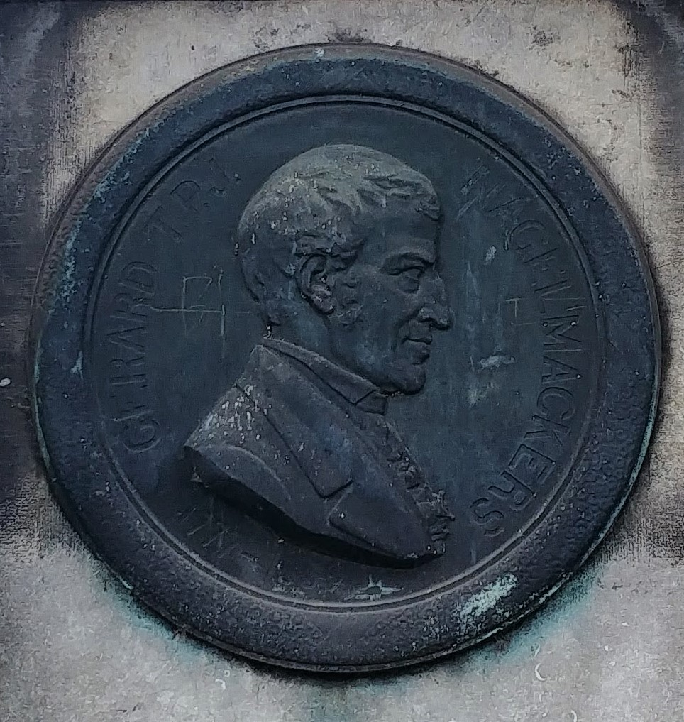 Médaillon de la sépulture familiale Nagelmackers au cimetière de la Diguette à Angleur (BE)